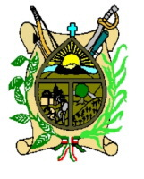 Stemma PEÑAMILLER - Querétaro